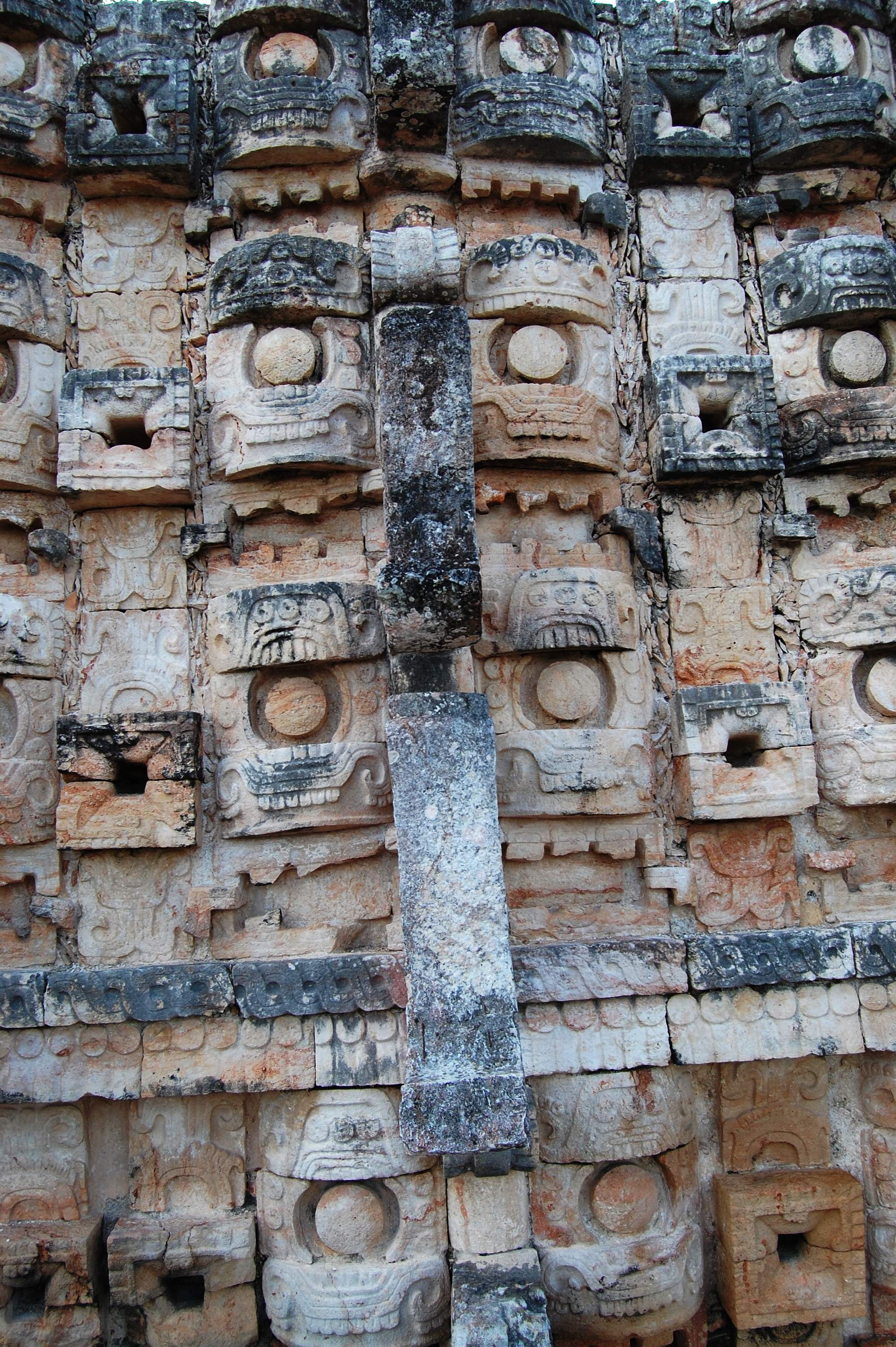 Kabah, Mexico